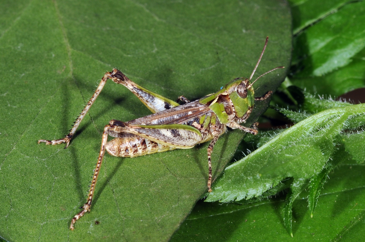 Myrmeleotettix maculatus, Weibchen, Mainzer Sand, Rheinland-Pfalz, Deutschland